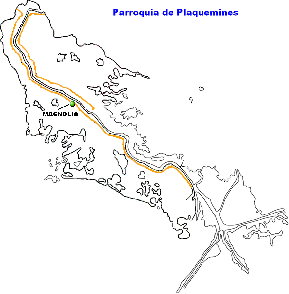 Magnolia, Louisiana.